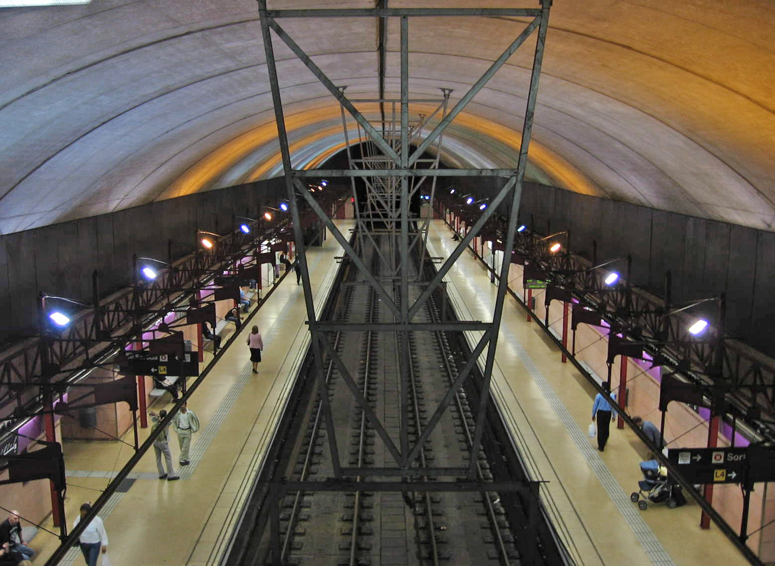 Trainroom of La Pau station, Barcelona Metro/Nau de l'estació La Pau, Barcelona